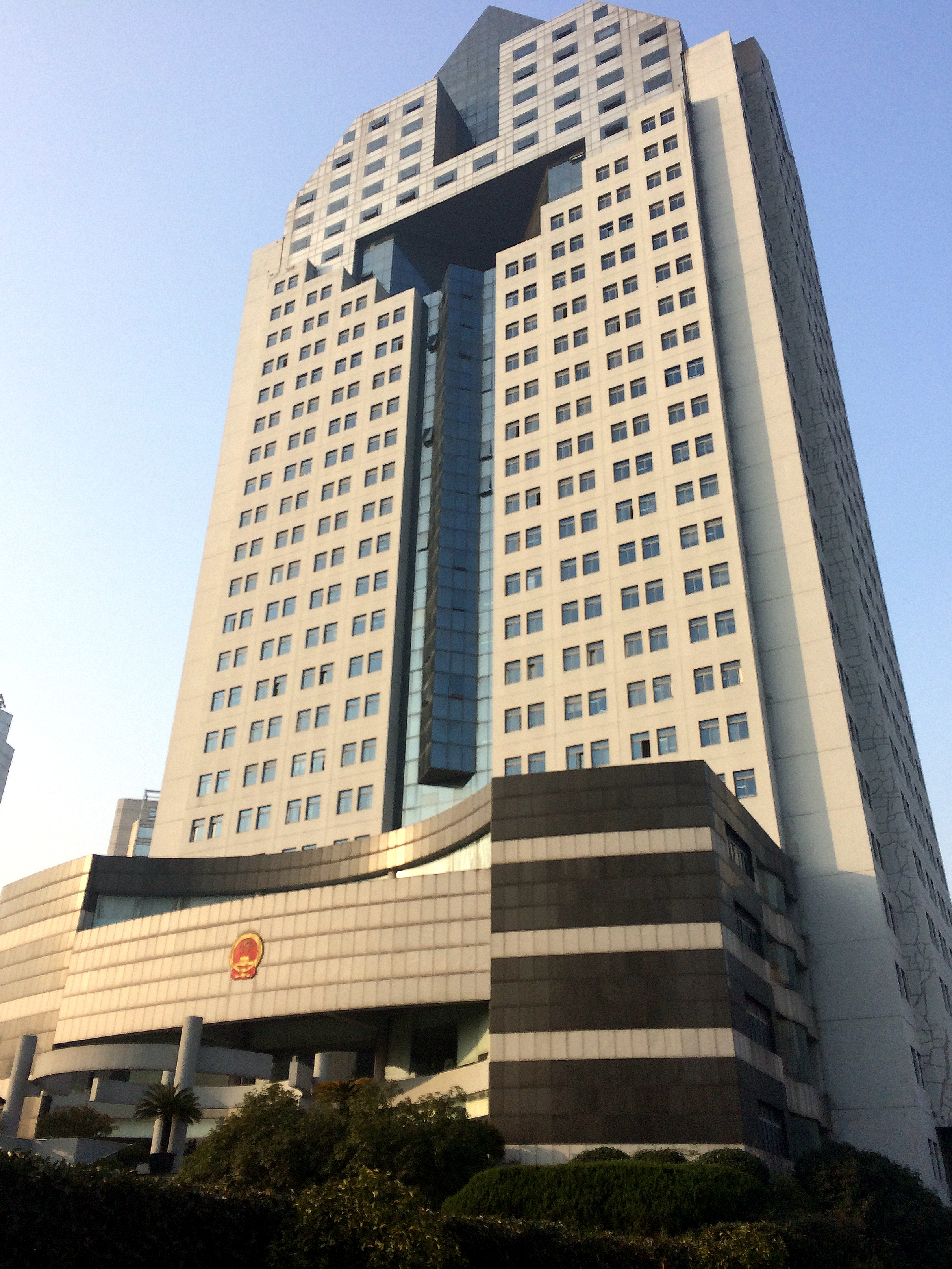 杭州市人民政府大楼（搬迁前）